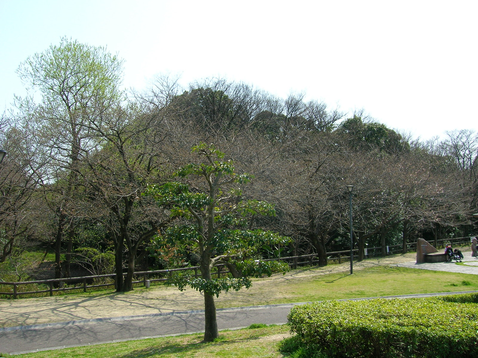 Ajiyoshi Futago-yama kofun (in Ajiyoshi kofun group). Loc: Kasugai city, Aichi Prefecture, Japan. 味美二子山古墳 撮影場所 愛知県春日井市